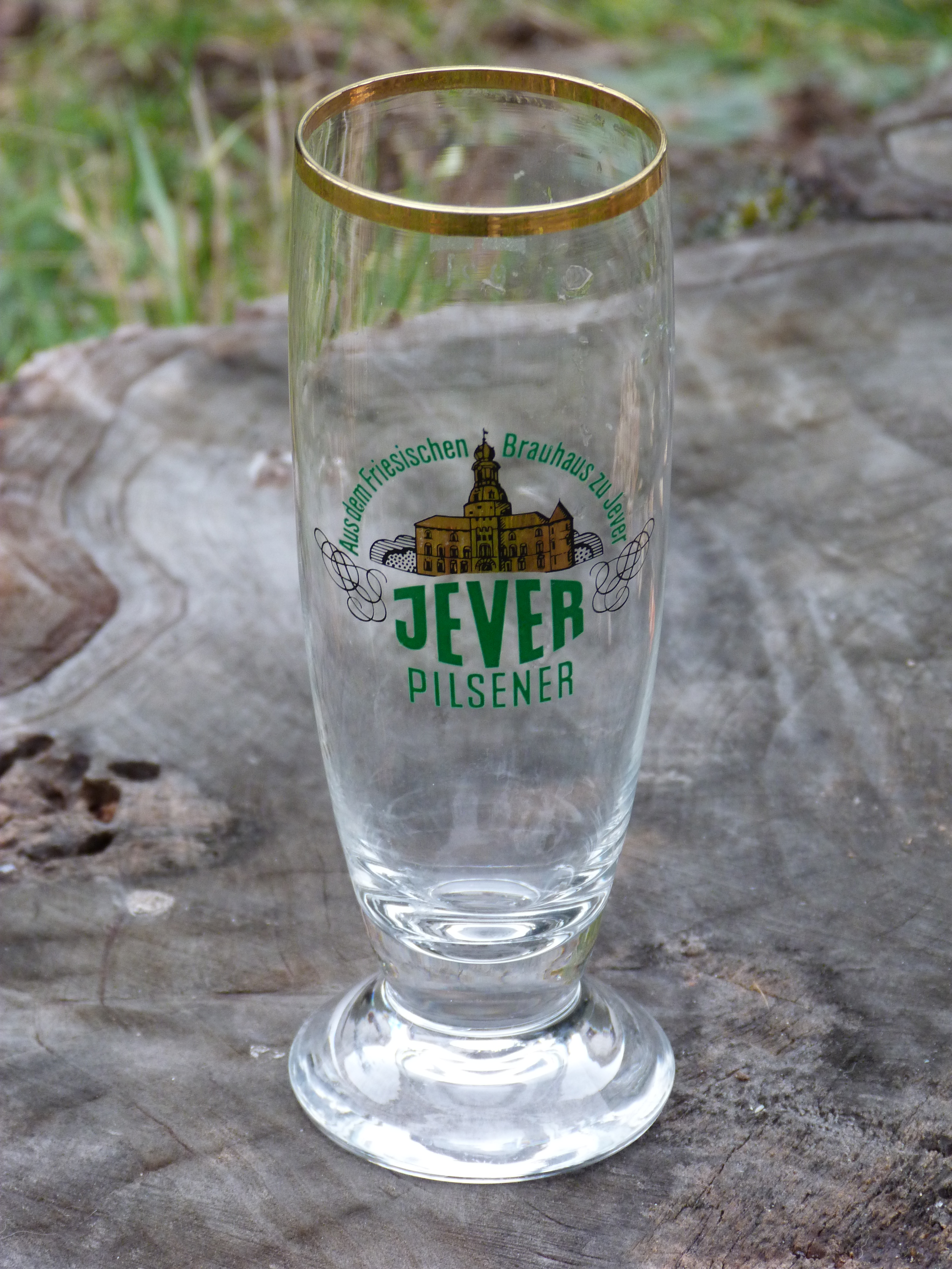 A felvétel 2013. december 14 –én készült. A söröspohár mérete: 16,5 cm x 5,5 cm. A pohár felirata: Aus dem Friesischen Brauhaus zu Jever Források: Jever fans Glaser ©© Derzsi Elekes Andor, Budapest, 2013, You are authorised to use these photos and vids under Creative Commons – even for commercial, for profit purposes. Photos must be attributed to Derzsi Elekes Andor. All of the photos and vids in the Metapolisz DVD line are under Creative Commons and can be used even for commercial – for profit – purposes. Recommended Citation Derzsi Elekes Andor: Metapolisz DVD line